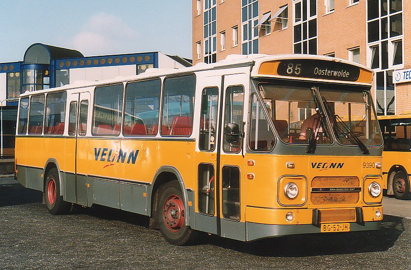 Veonn 9390, ex FRAM 9390 van het type DAF MB200DKDL564 / Den Oudsten te Groningen